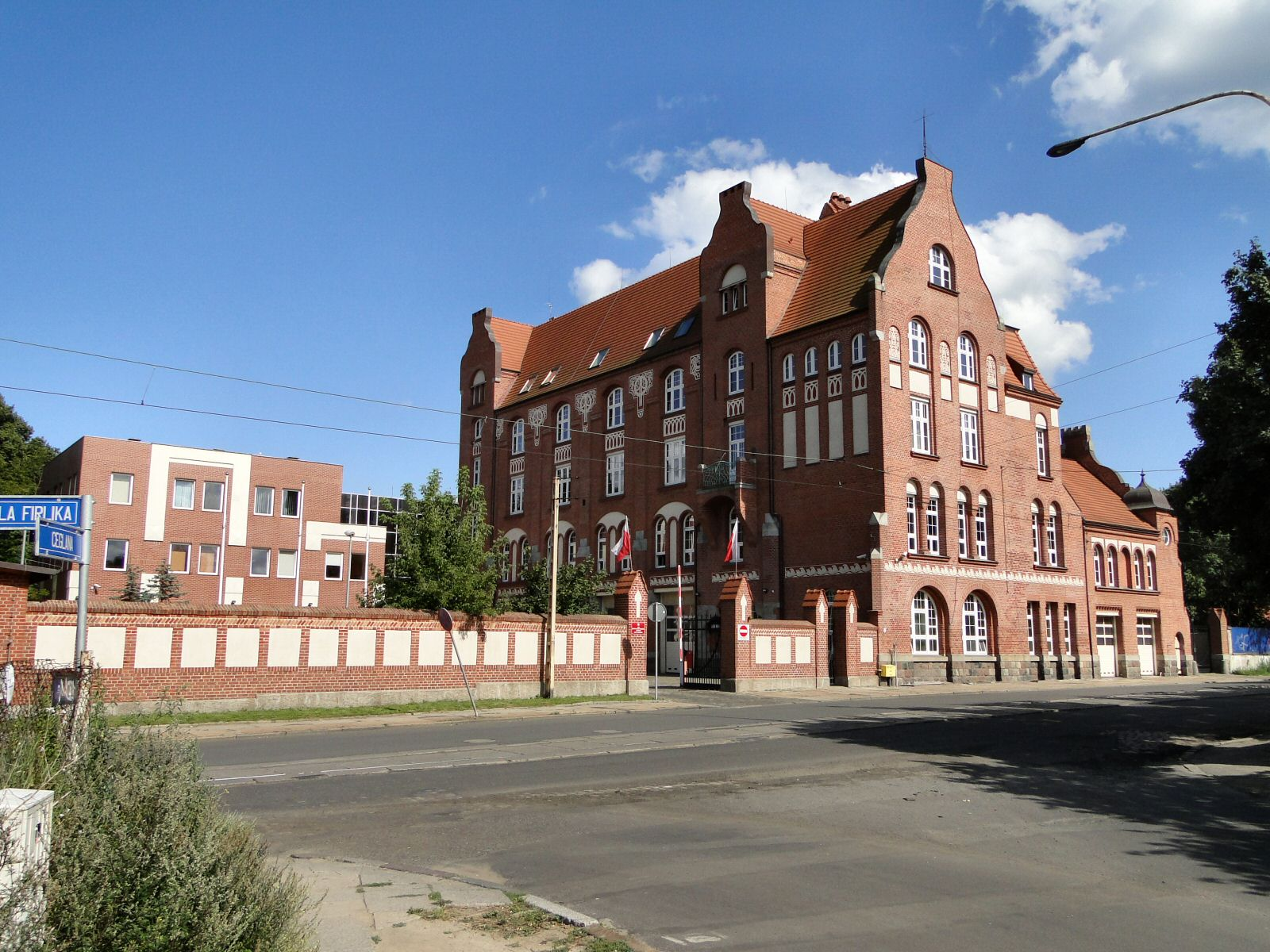 Zabudowania Straży Pożarnej przy ul. Firlika w Szczecinie